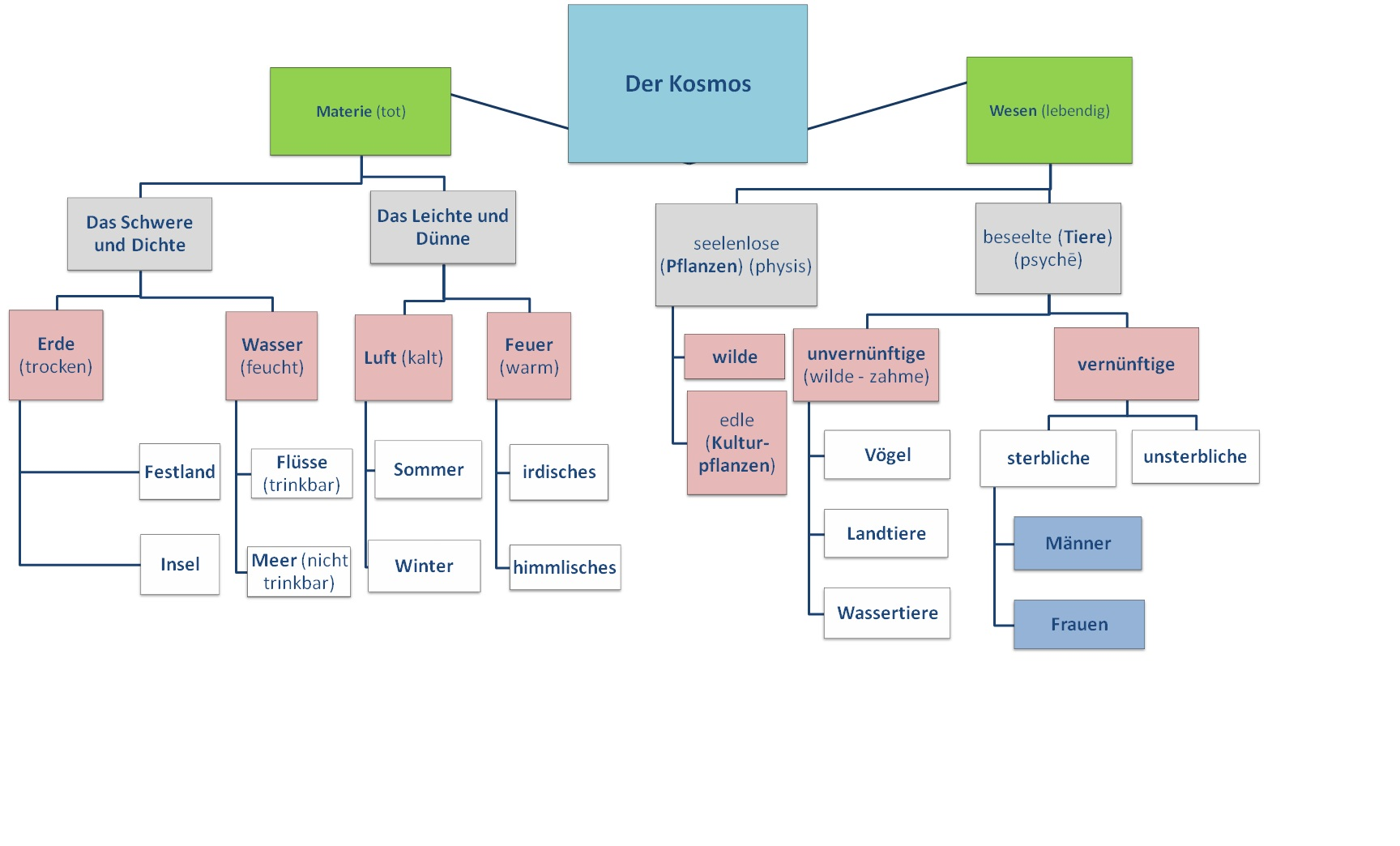 Einteilung des Kosmos bei Philon v. Alexandrien nach Hans Leisegang: Denkformen, Walter de Gruyter, Berlin 1951, S. 243